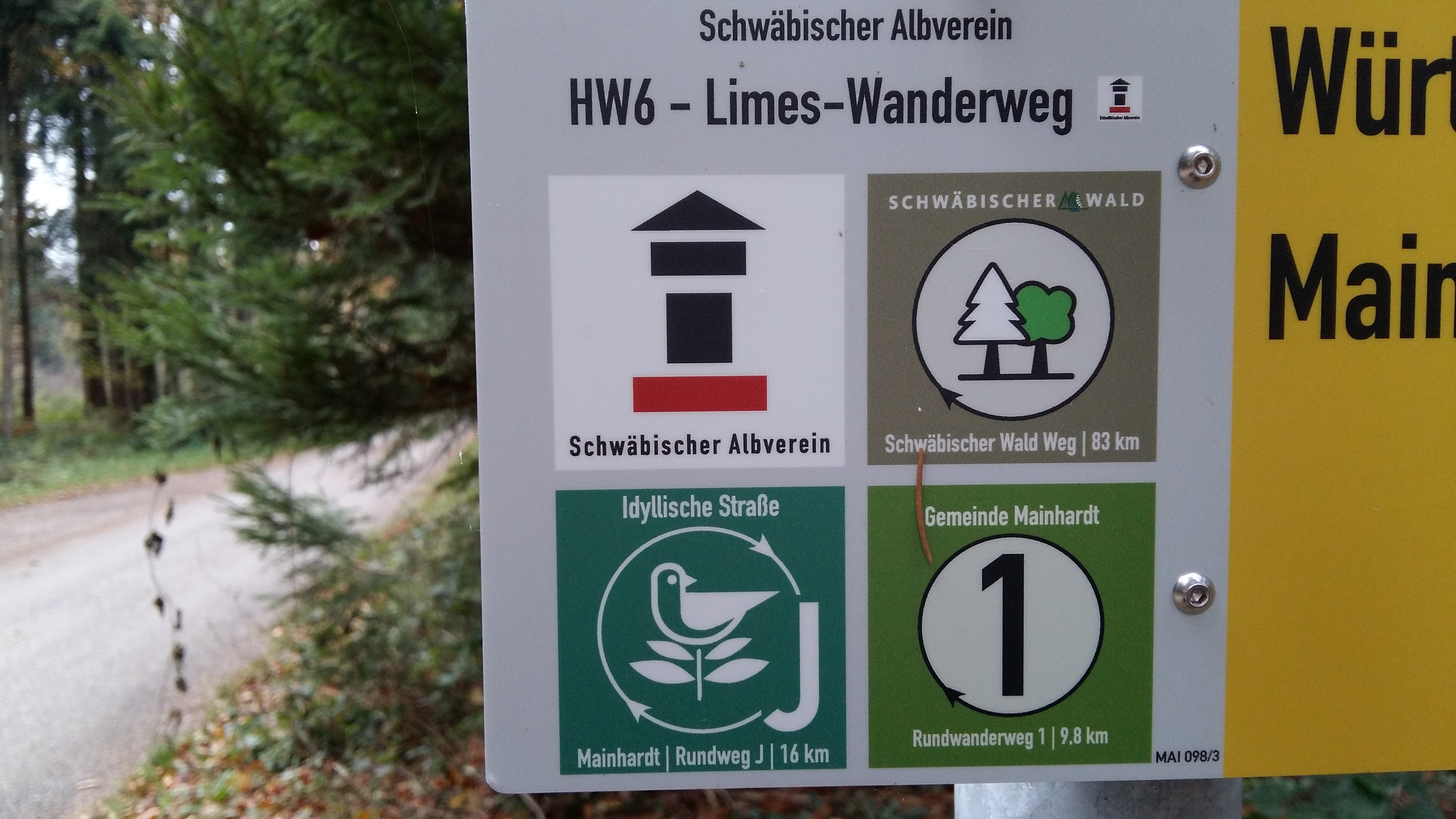 Panneaux de randonnée des quatre grands circuits thématiques de Mainhardt